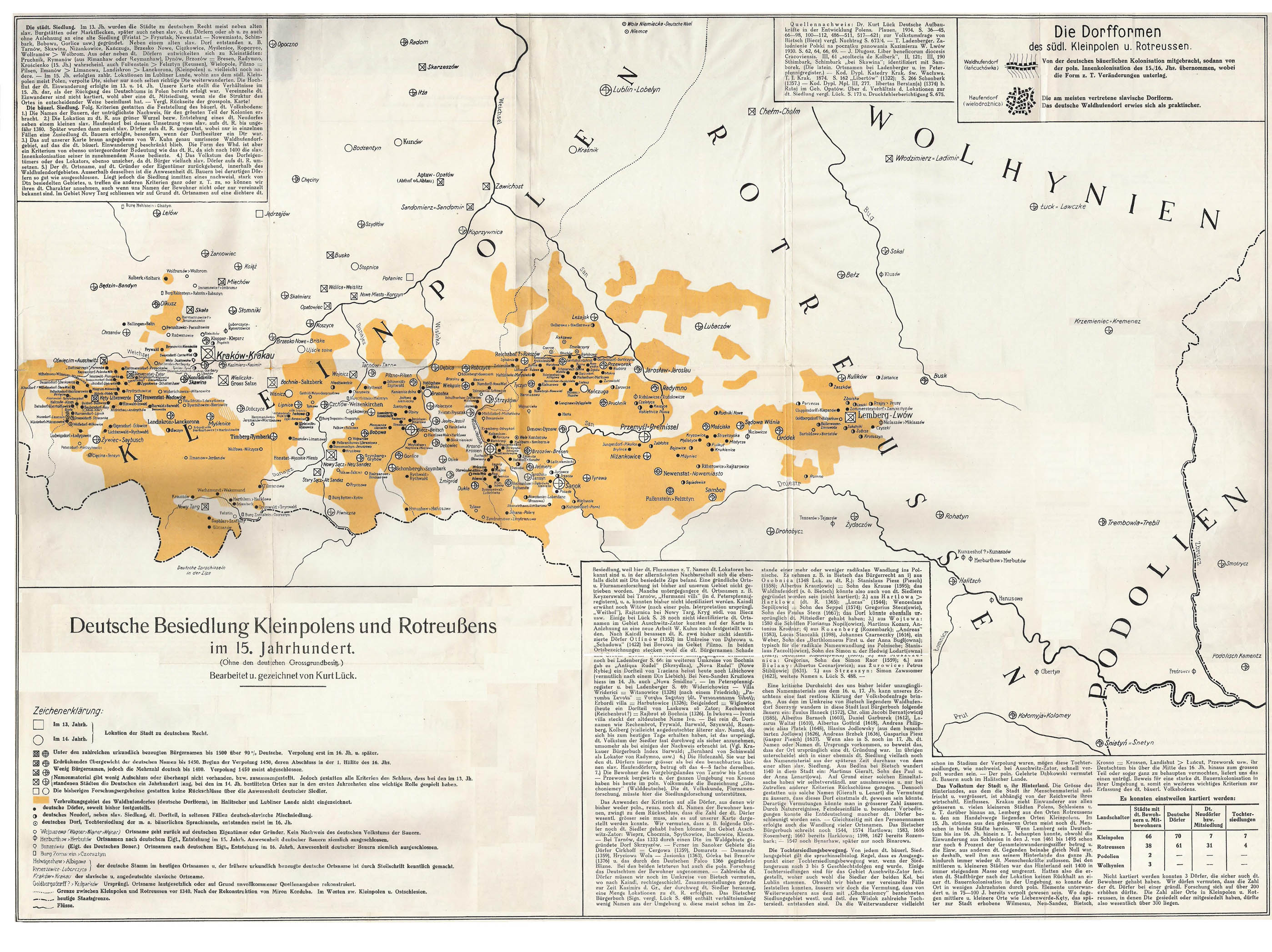 Deutsche Besiedlung Kleinpolens und Rotreussens im 15. Jahrhundert. Kurt Lück. 1934. Kurt Lück: Deutsche Aufbaukräfte in der Entwicklung Polens. Forschungen zur deutsch-polnischen Nachbarschaft im ostmitteleuropäischen Raum, Posen 1934.